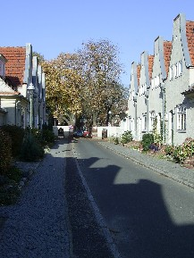 Gartenstadt Staaken, Berlin-Staaken, Straße Zwischen den Giebeln, 2003